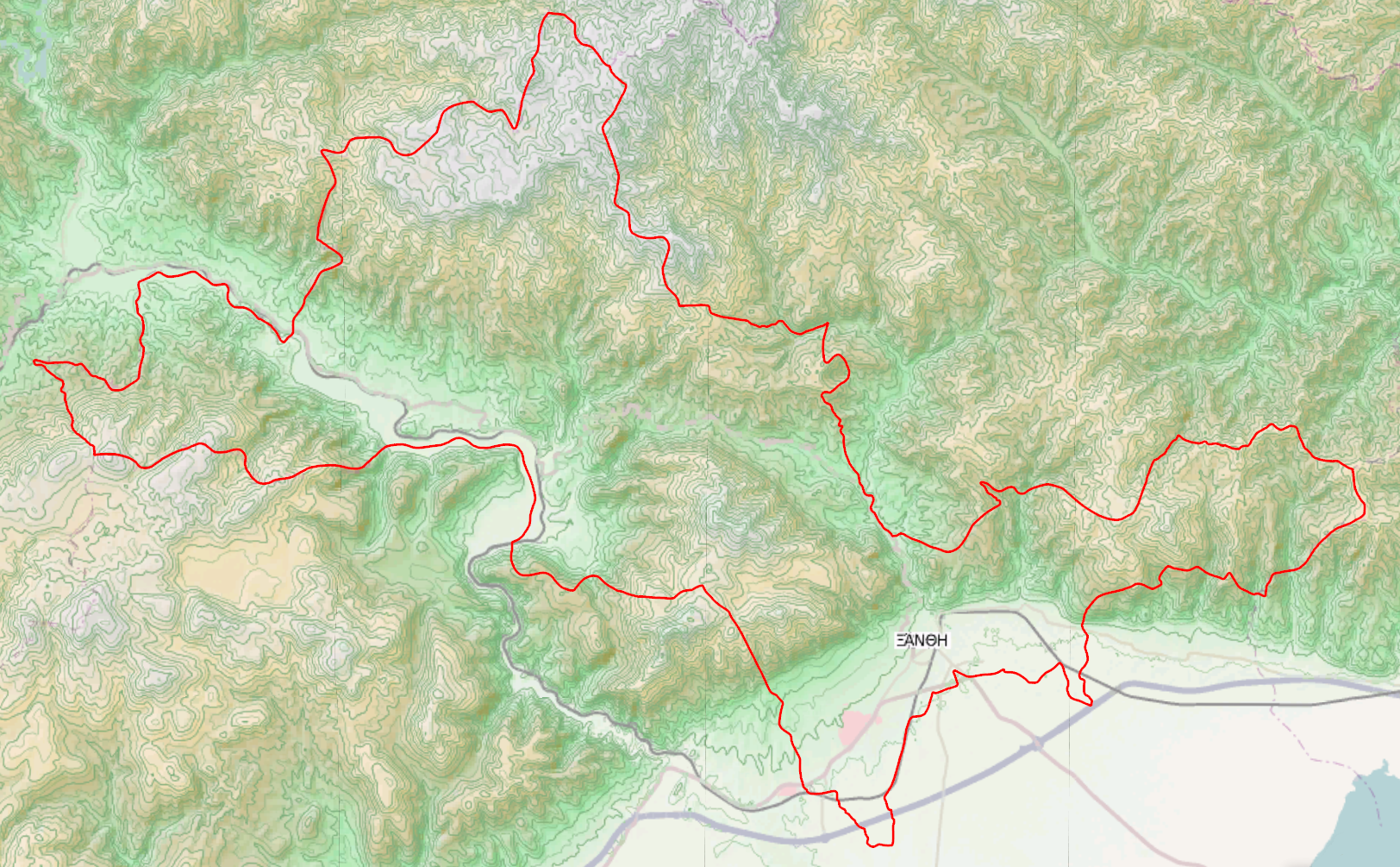 Τοπογραφικός χάρτης του Δήμου Ξάνθης